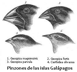 Pinzones de Darwin o pinzones de las Galápagos. Darwin, 1845. Diario de investigaciones de la historia natural y geología de los países visitados durante el viaje del H.M.S. Beagle alrededor del mundo, comandado por el capitán Fitz Roy, R.N. 2ª edición.